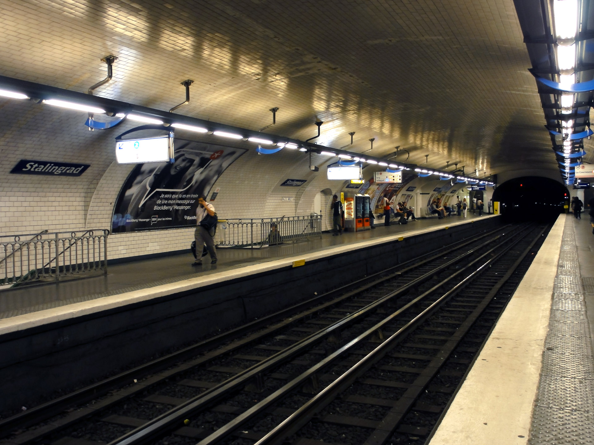 La station Stalingrad de la ligne 7 du métro de Paris, France.